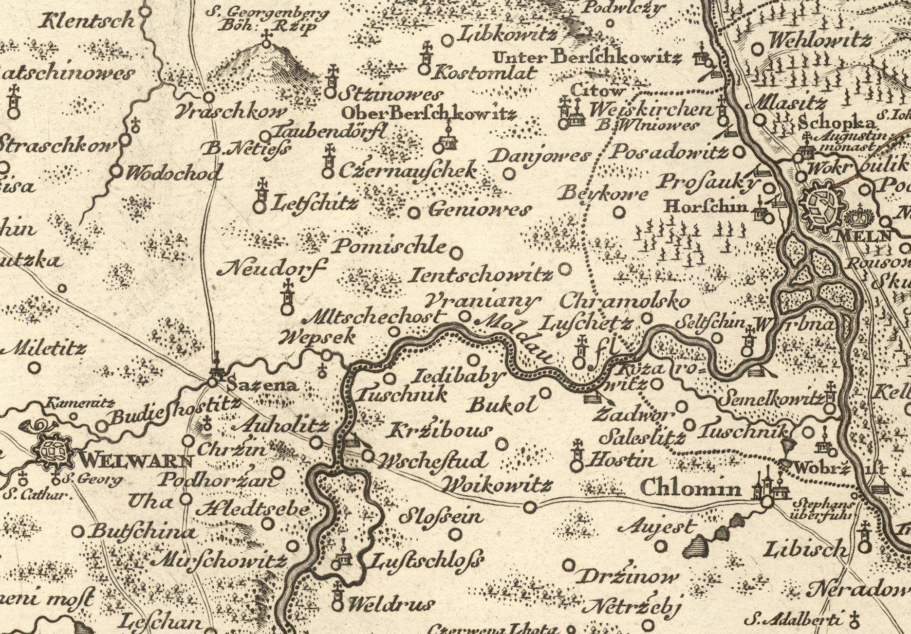 Výřez z mapového listu VIII Müllerovy mapy Čech, na kterém je zobtazena obec Dušníky nad Vlatavou